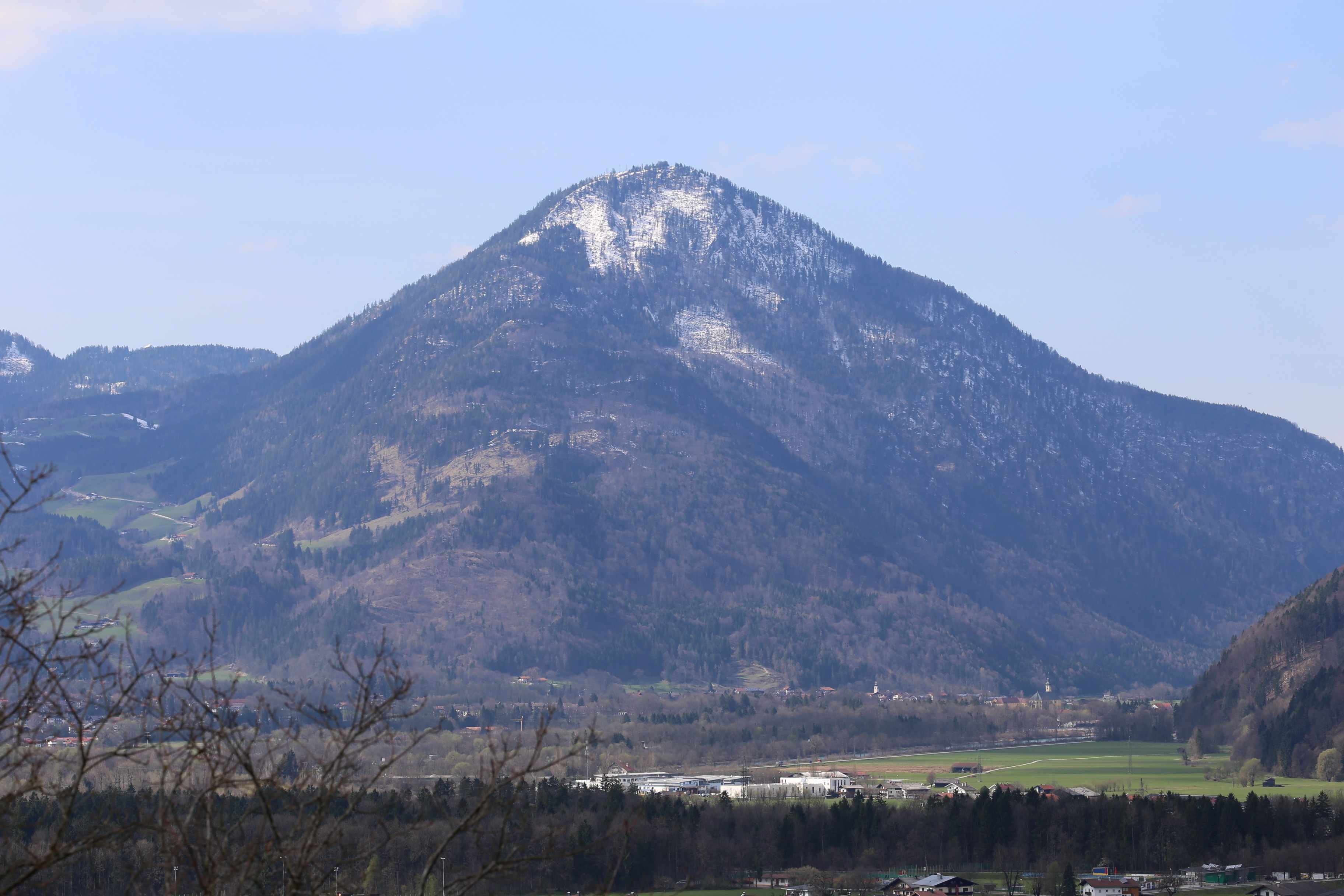 Der Wildbarren; gesehen von St. Nikolaus, Ebbs